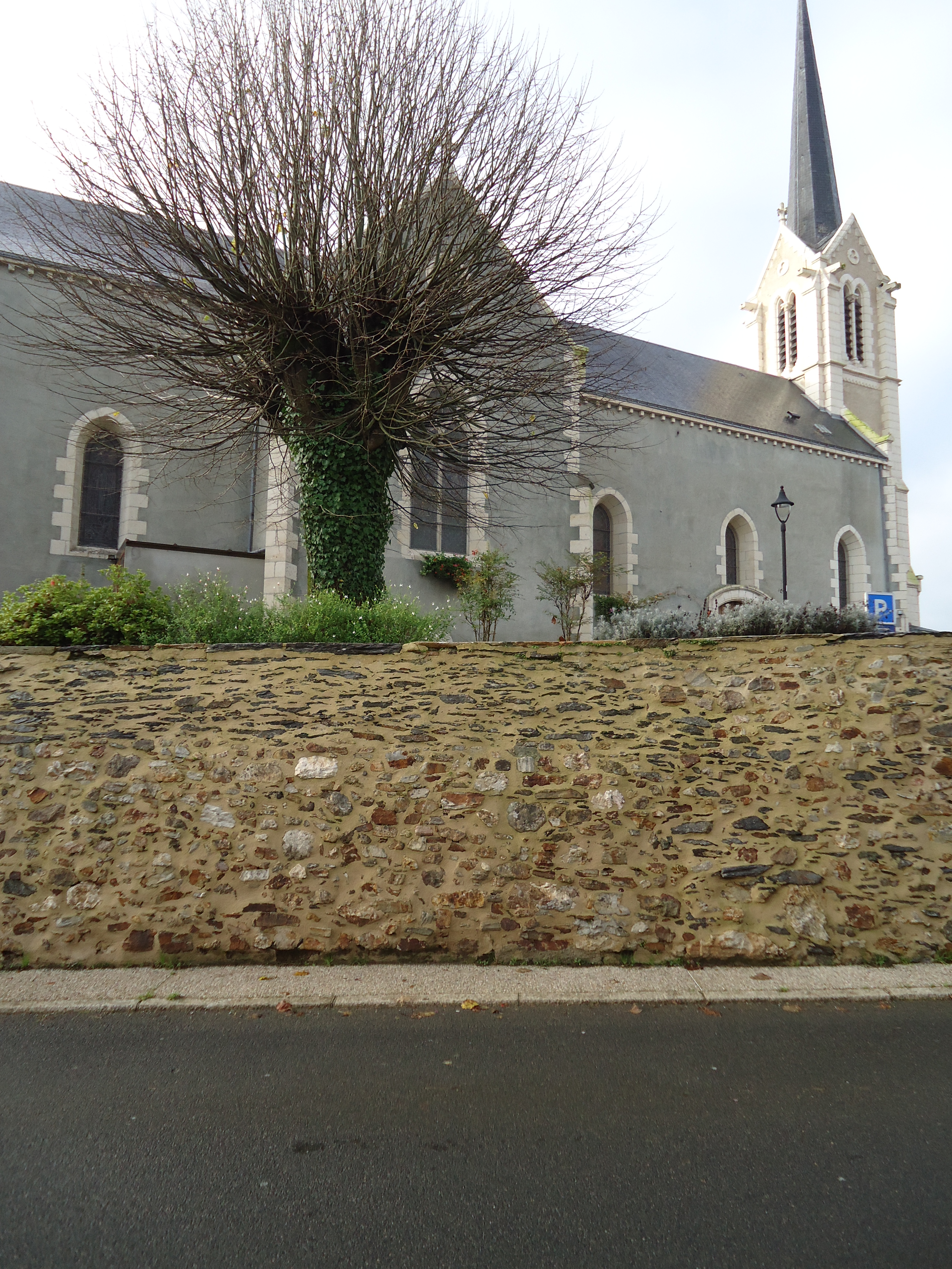 Eglise